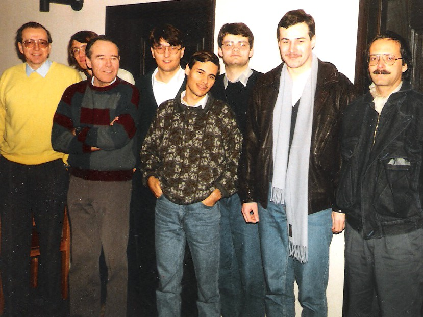 Die erste Mannschaft der Freiburger Schachfreunde 1887 im Jubiläumsjahr 1987. Von links nach rechts: Rainer Frank, Pekka Kauppala, Georg Studier, Christian Thoma, Konrad Fuchs, Klaus Dietrich, Edwin Bach und Andreas Becker.